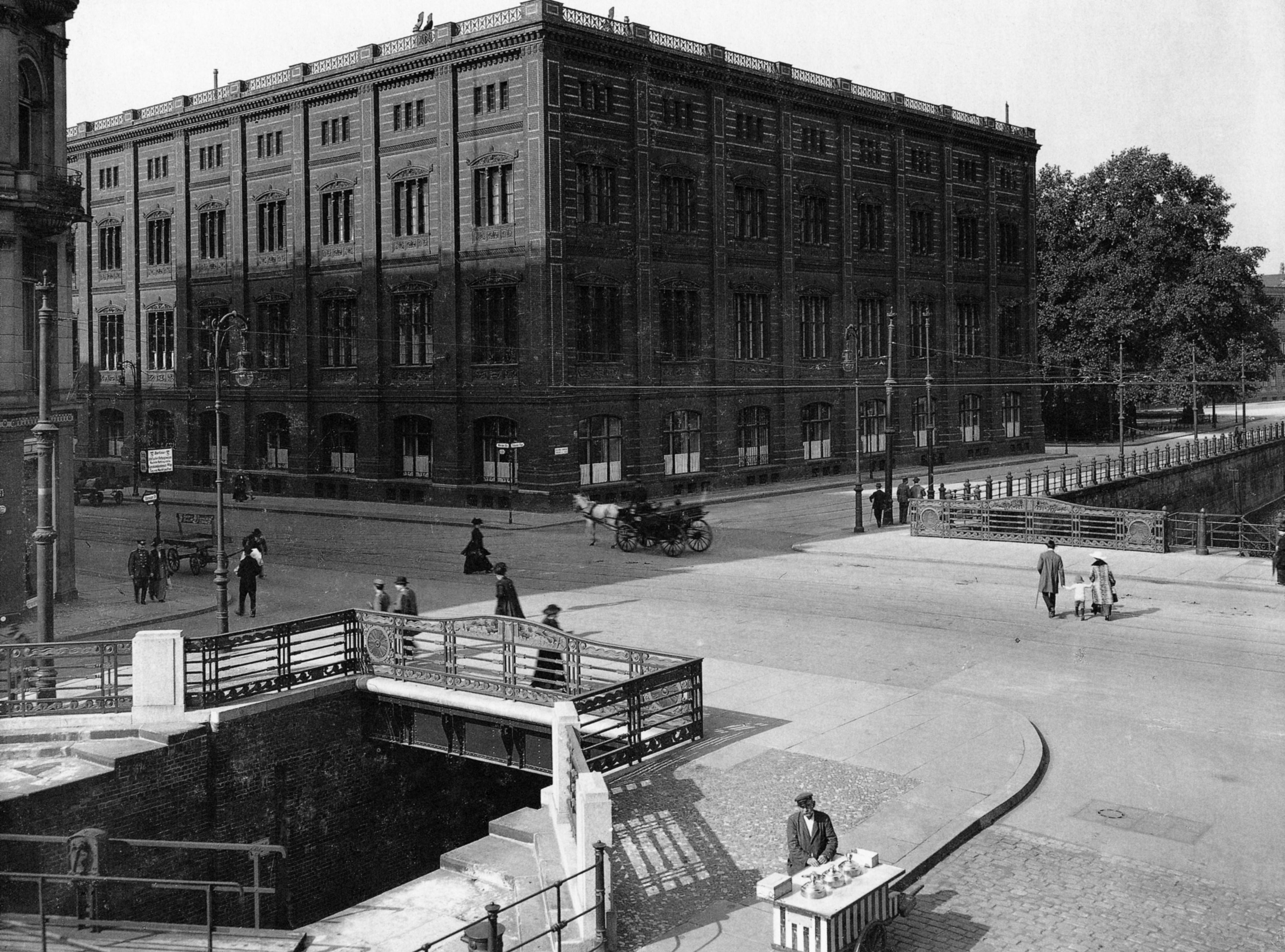 Schleusenbrücke über die Spree und Bauakademie in Berlin